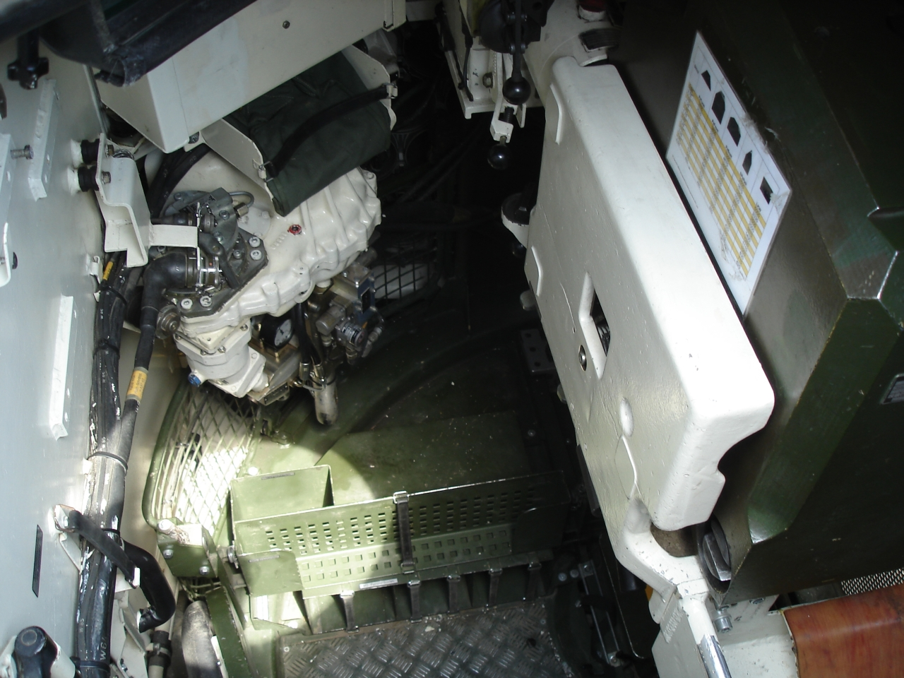 Ladeschützenplatz im Leopard 2A4